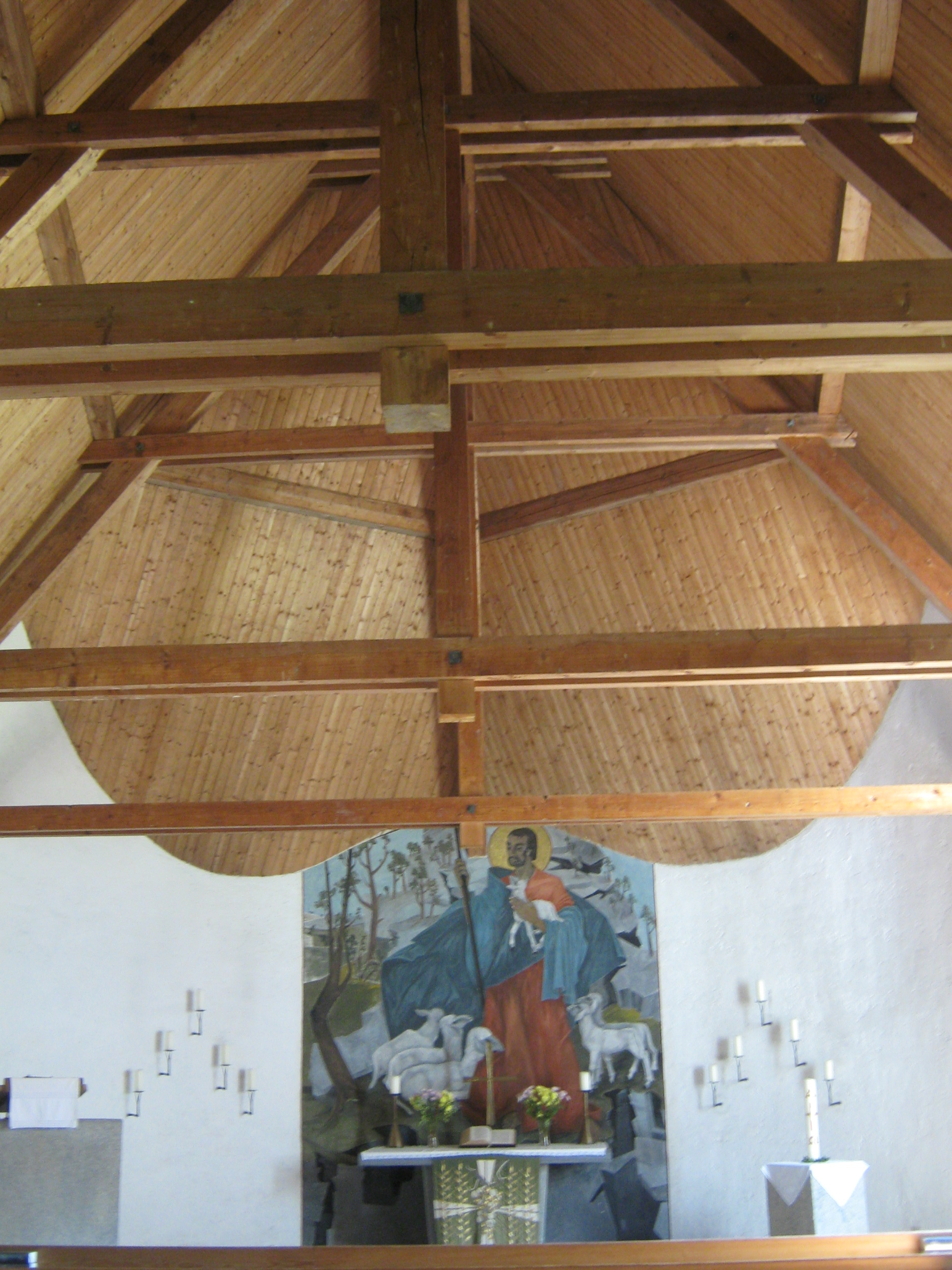 Evangelische Kirche Zum Guten Hirten in Ramsau bei Berchtesgaden, Altar und Deckenkonstruktion